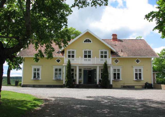 Berga Herrgård